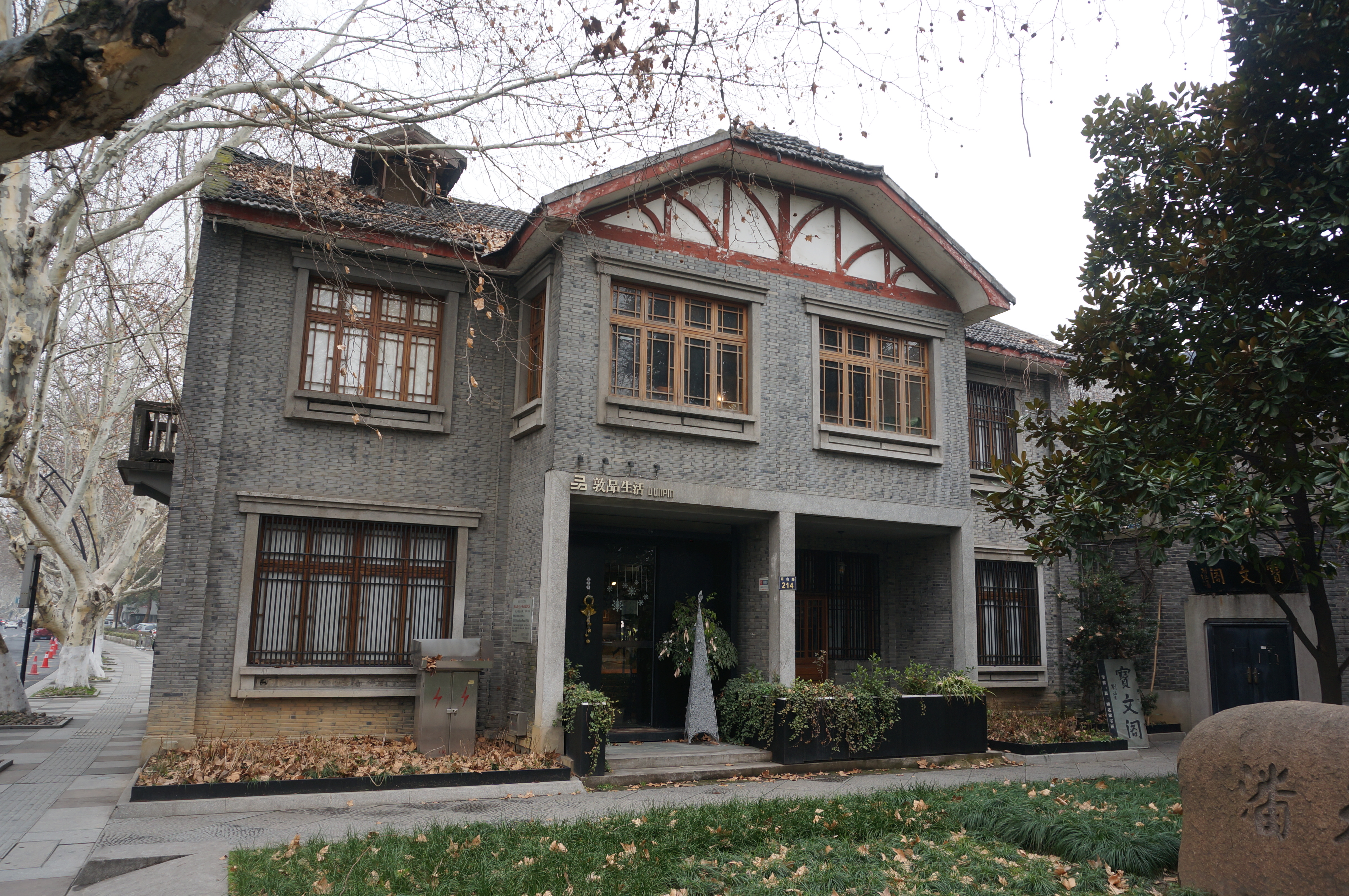 南山路214号别墅建筑，南面。